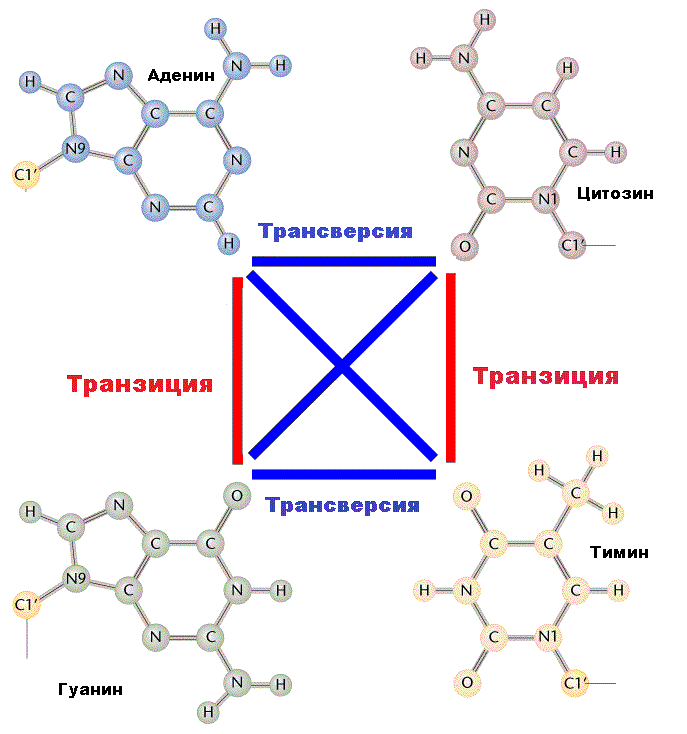 На изображении указана вариативность транзиционных и трансверсивных замен